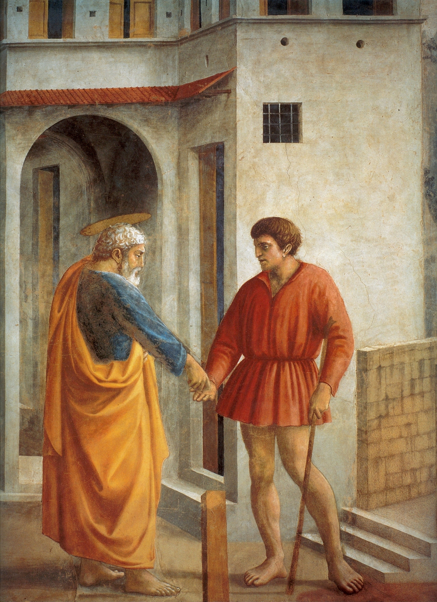 detail (restaurato)